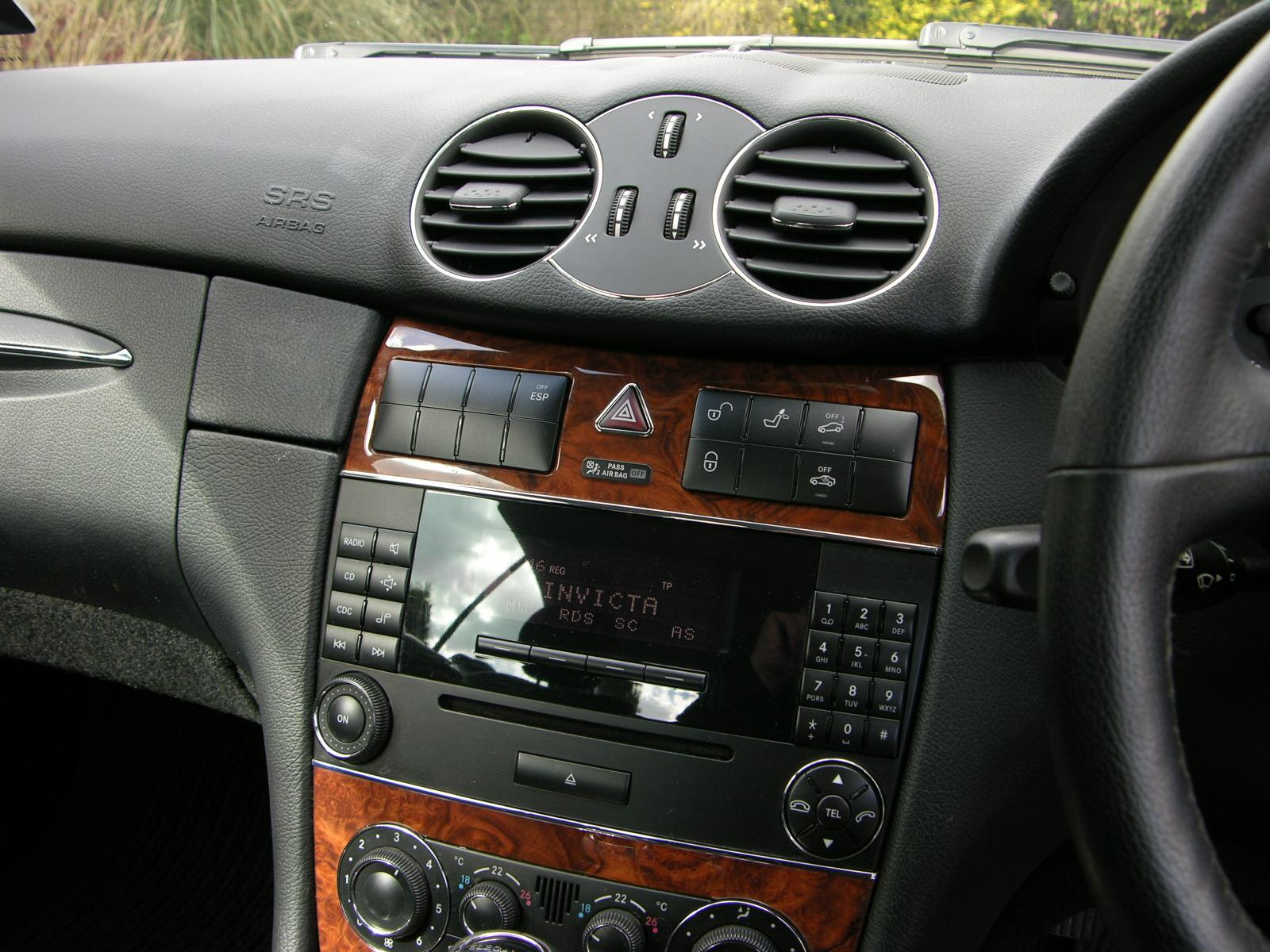 Mercedes Benz CLK 200 Kompressor